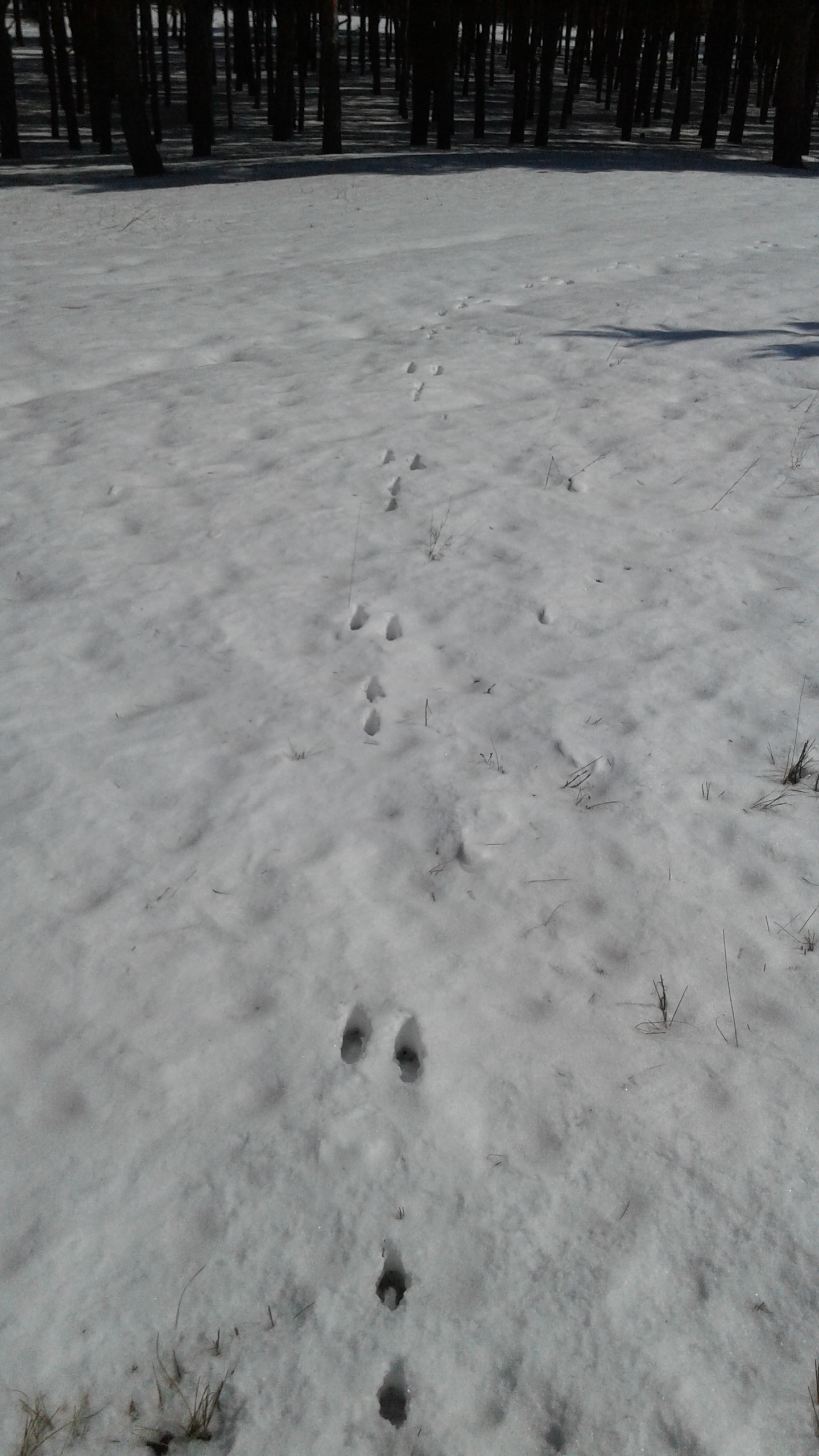 Заячі сліди. Миколаївщина